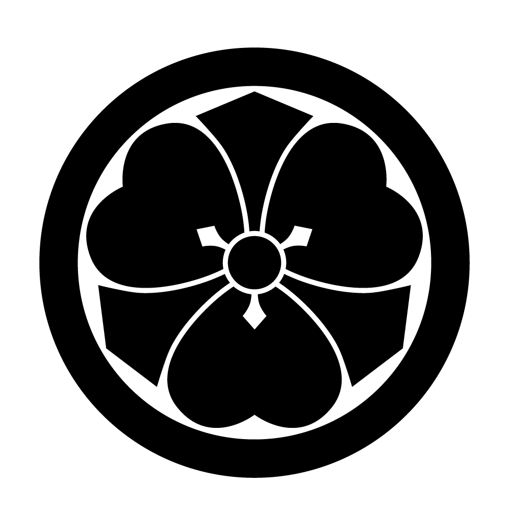 家紋・片喰紋のひとつ「丸に剣片喰」